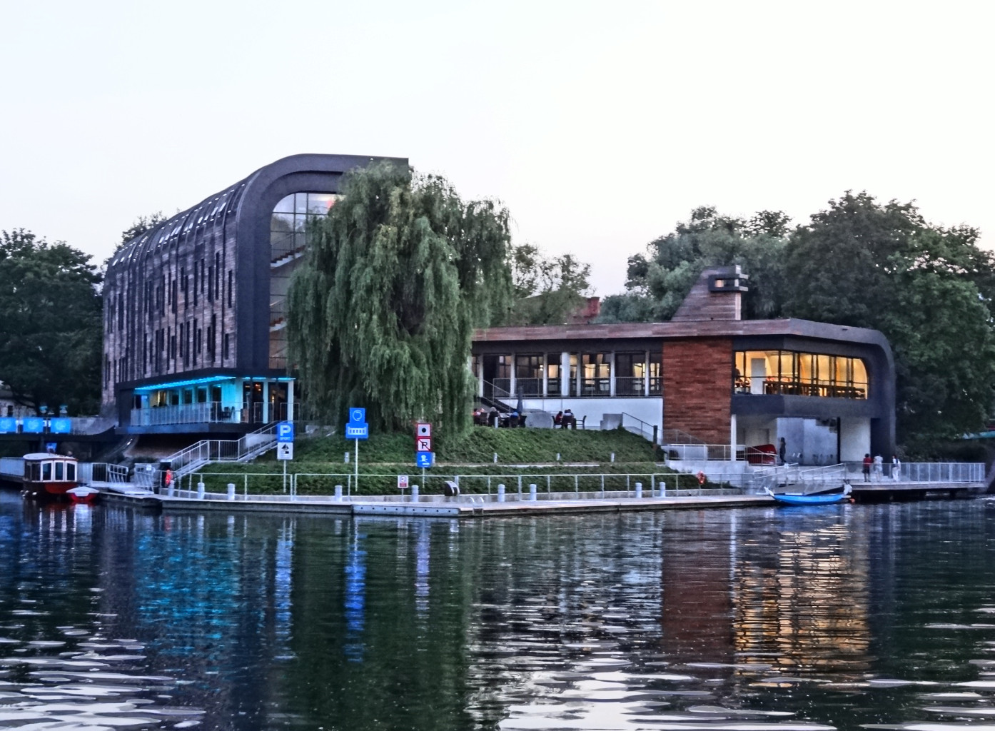 Przystań Bydgoszcz na Wyspie Młyńskiej